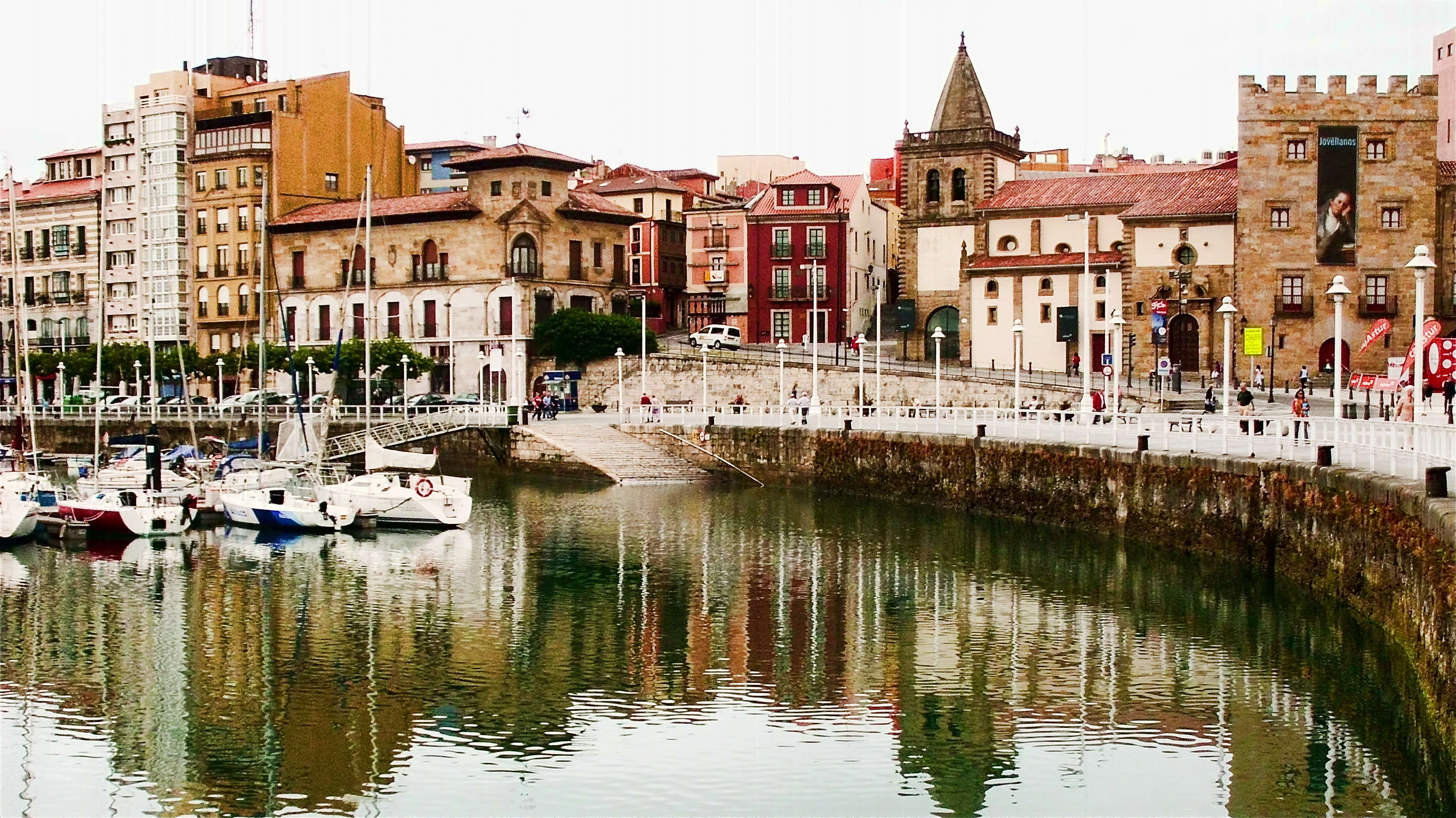 Gijón, Asturias